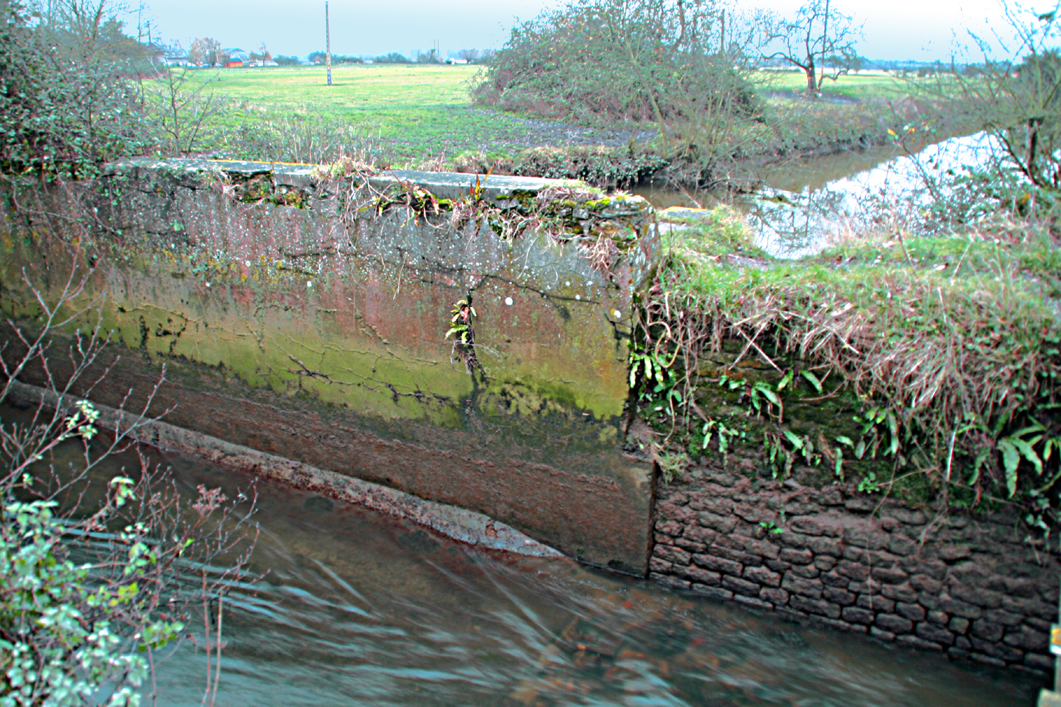 le grand canal passe sous la rivière l'Ancre grâce à un siphon